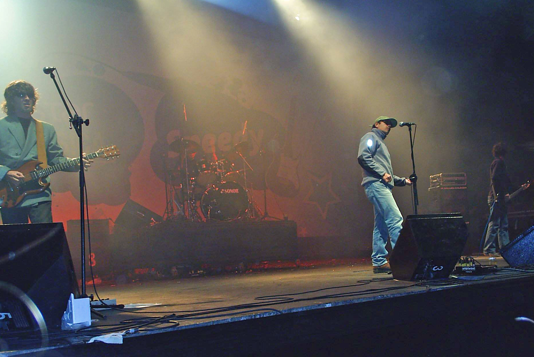 Derivado de Image:Mar de copas.jpg